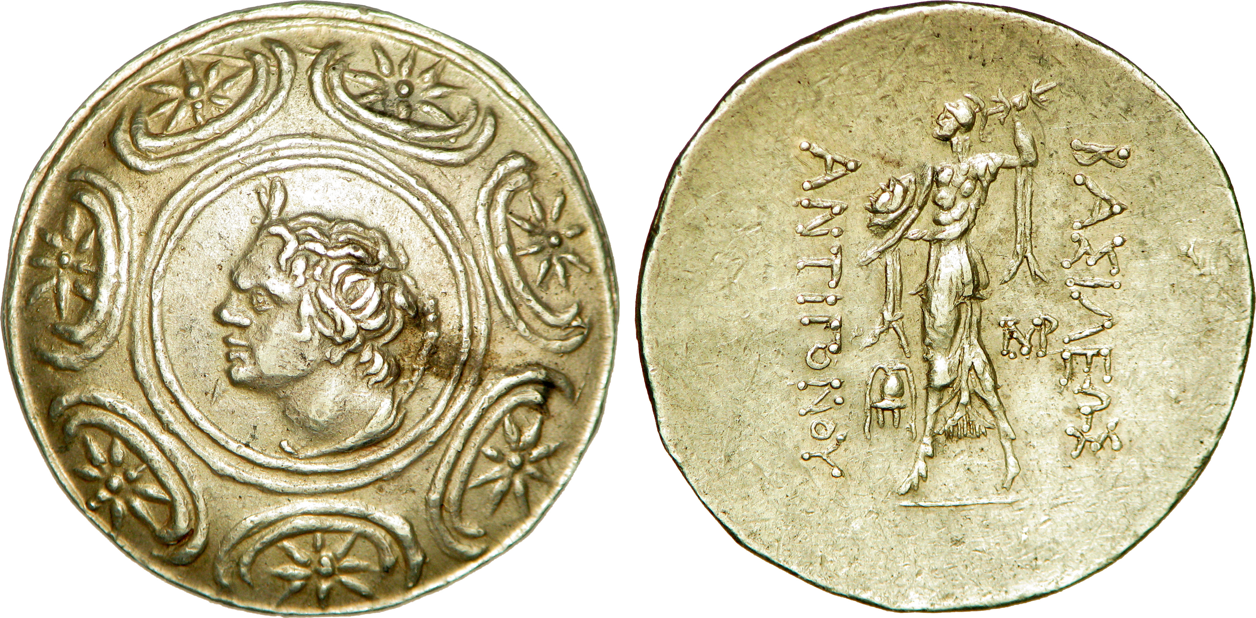 Nom de l'atelier : Macédoine, Amphipolis Métal : argent Diamètre : 32,5mm Axe des coins : 12h. Poids : 17,12g Titulature avers : Anépigraphe. Description avers : Bouclier macédonien orné de sept astres dans un double cercle ; au centre, tête de Pan tourné à gauche. Description revers : Athéna Alkidémos marchant à gauche, casquée et drapée avec l'égide, brandissant un foudre de la main droite et tenant un bouclier de la gauche ; dans le champ à gauche, un casque macédonien ; monogramme dans le champ à droite. Légende revers : BASILEWS// ANTIGONOU/ (AMR)